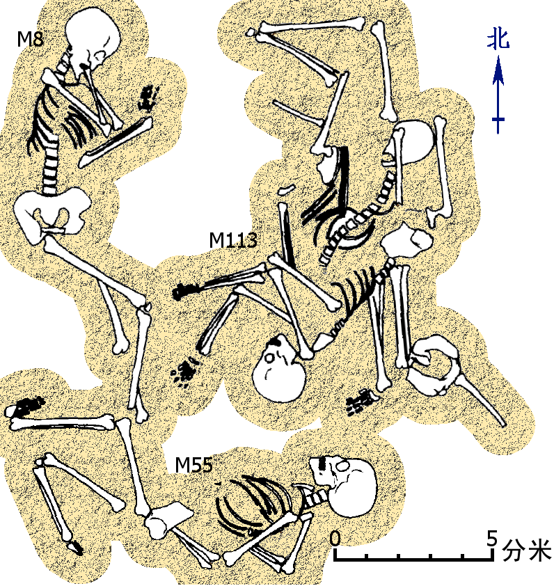 二里头三期M8、M55、M113三处无圹墓的四具骨架。